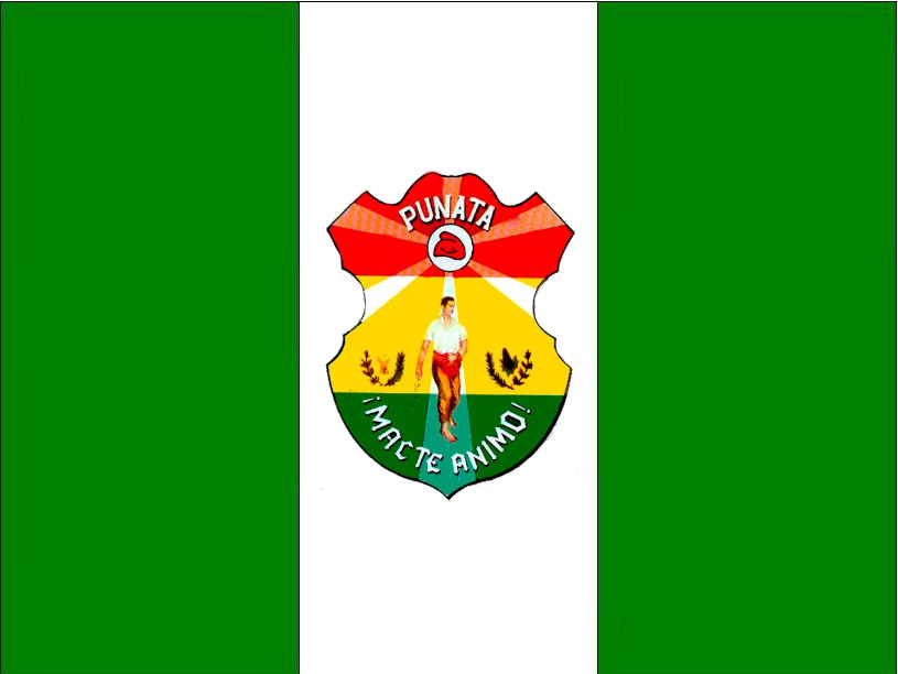 Bandera del Municipio de Punata con el Escudo.